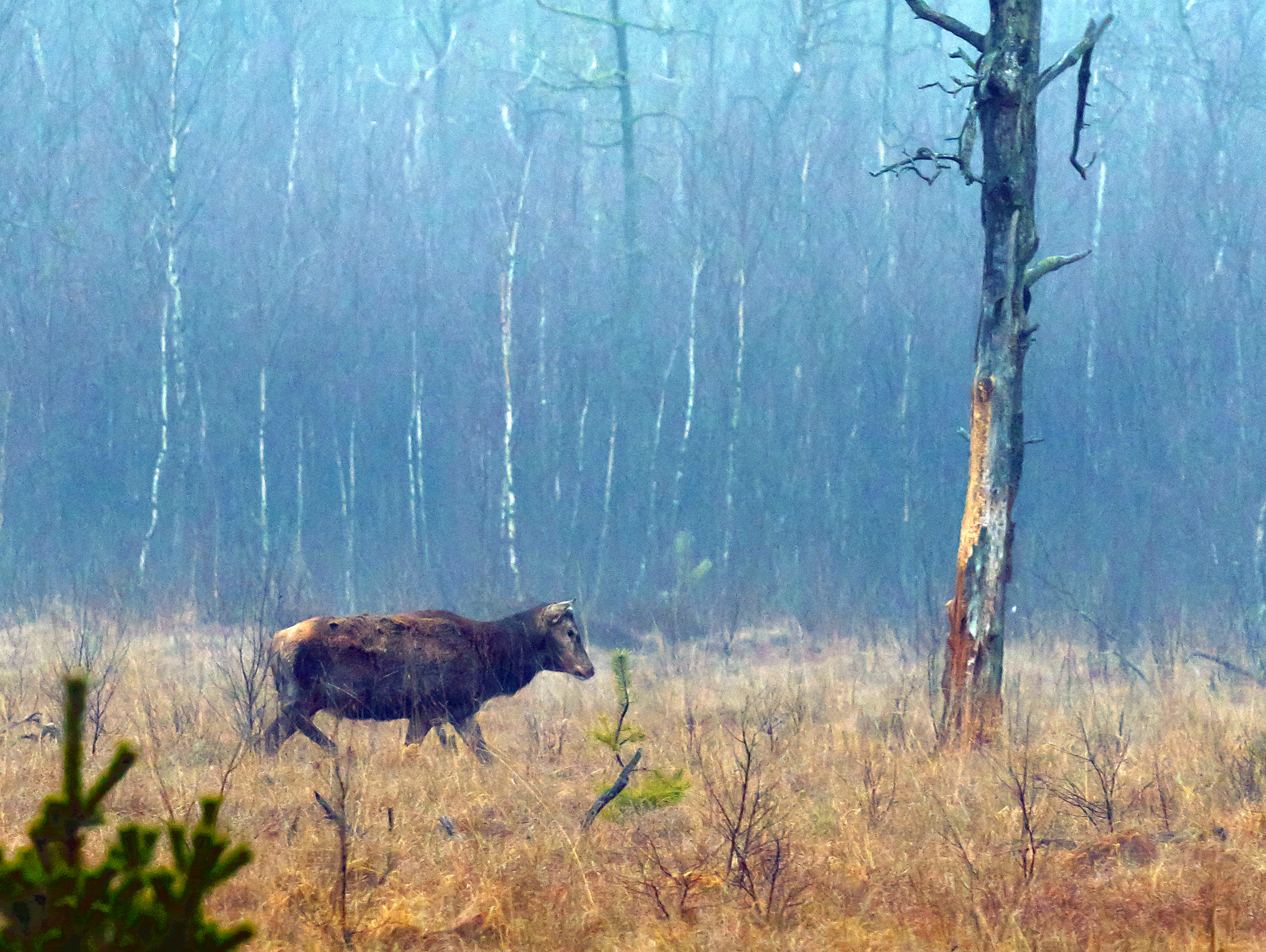 Rothirsch im Kieshofer Moor, aufgenommen im Naturschutzgebiet Kieshofer Moor: N 8